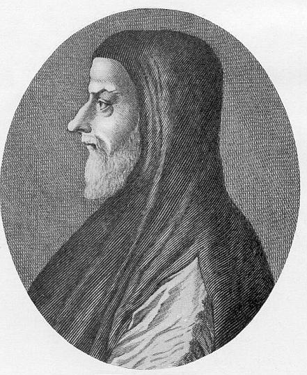 Basilius Bessarion (1395/1403–1472), griechischer Kardinal von Trapezunt. Stich von J.C.G. Fritzsch aus Christian Friedrich Boerner, de doctis hominibus graecis graecarum literarum in Italia instauratoribus, Leipzig 1750.